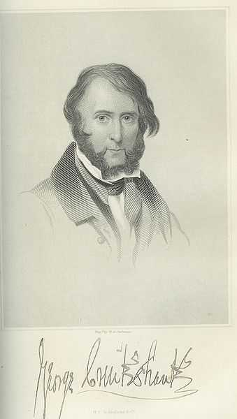 Scansione da un libro del 1858 "cyclopedia of Wit and Humor" edito da William E. Burton. Posted with permission from Kevin Bryant - . Foto e libro entrambi di pubblico dominio.